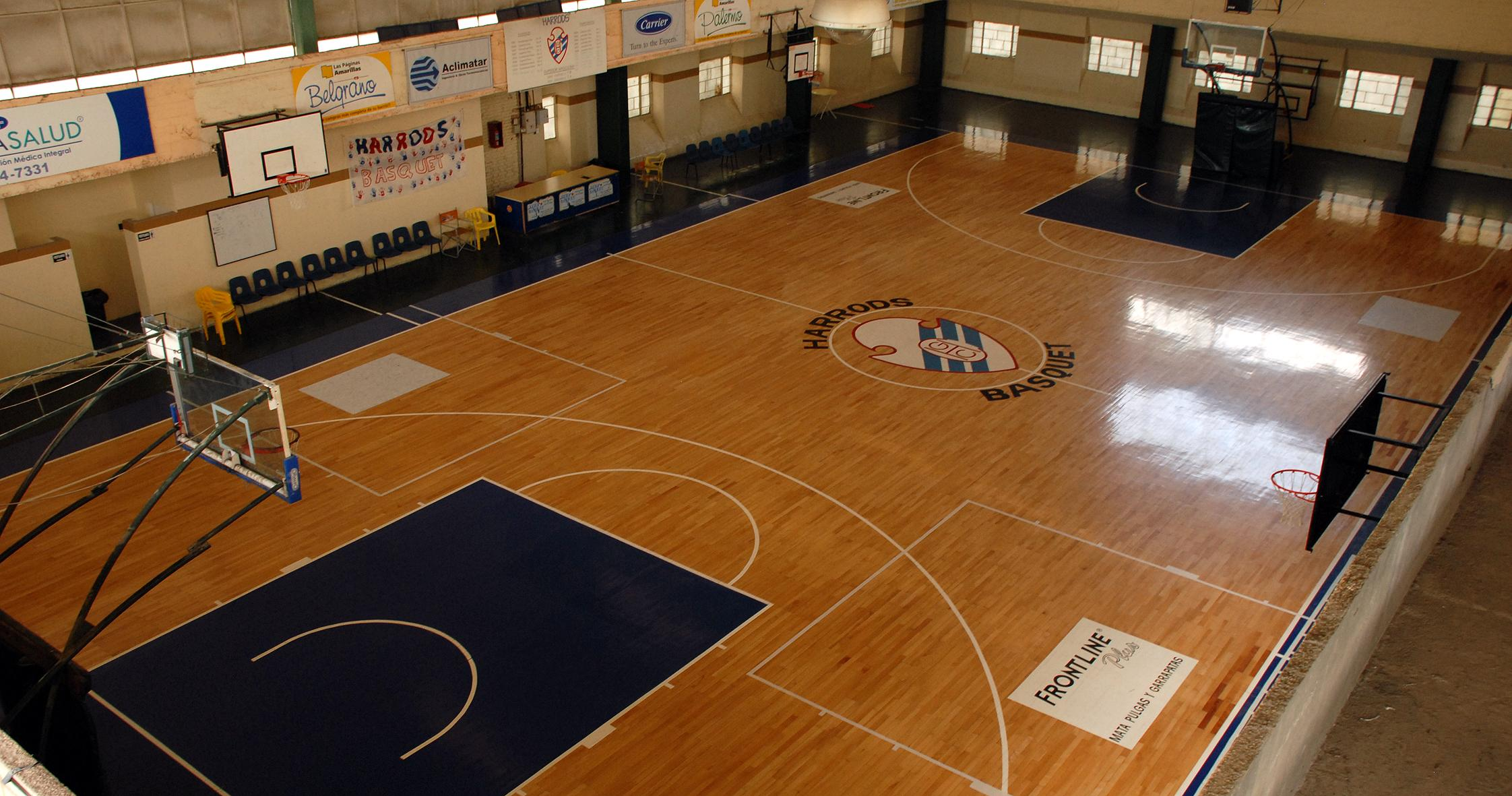 Basquet 2